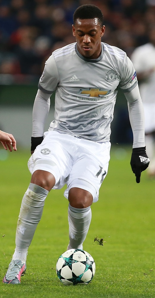 Матч между ЦСКА и «Манчестер Юнайтед» 27 сентября 2017 года